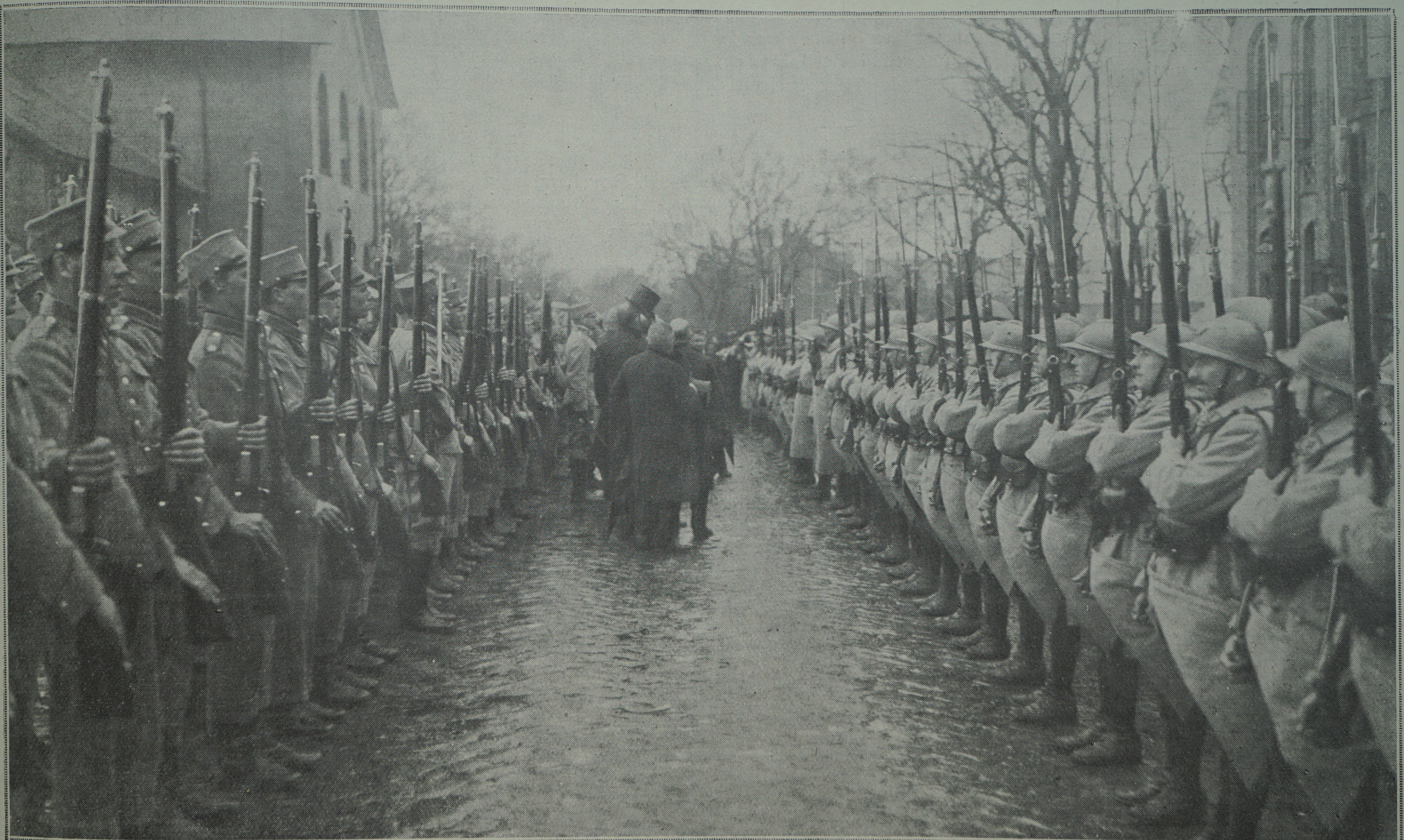 du journal L'illustration de 1920. Les troupes danoises relèvent les troupes françaises à Hadersleben.